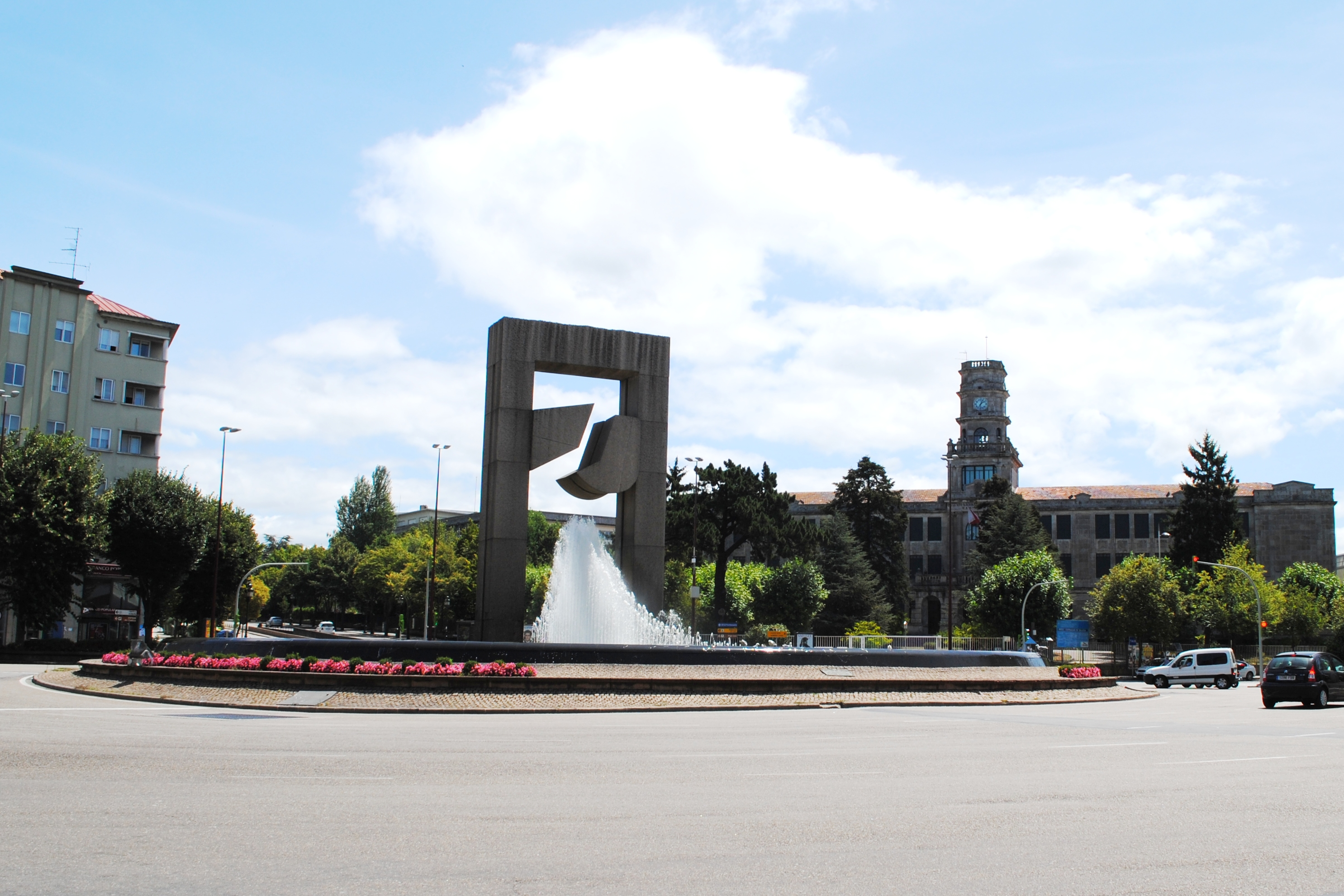 Praza de América de Vigo. En primeiro plano a Porta do Atlántico do escultor Silverio Rivas. En segundo plano o instituto Santa Irene do arquitecto Antonio Cominges Tapia.